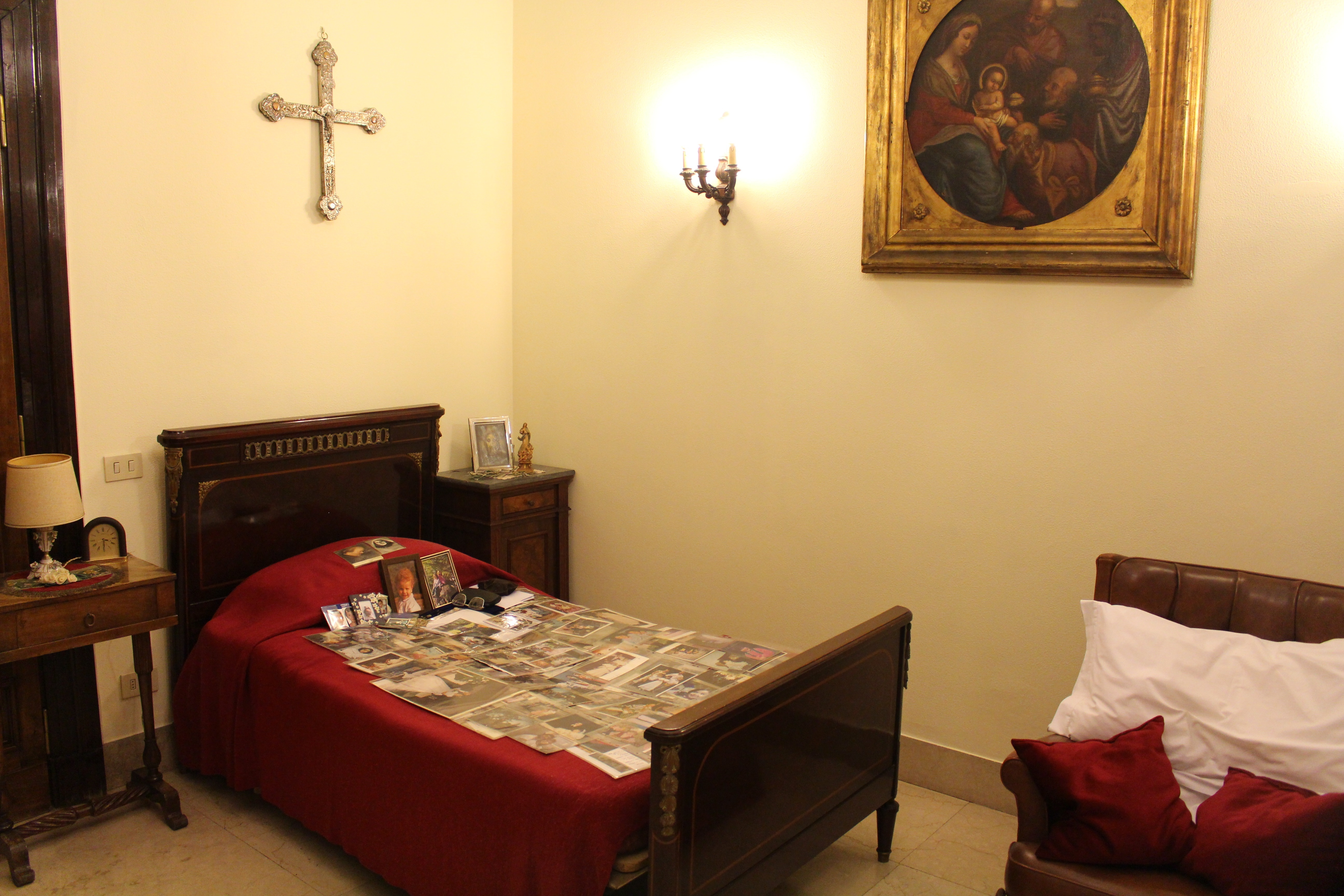 Sterbezimmer des Ehrwürdigen Diener Gottes Padre Ildebrando Gregori